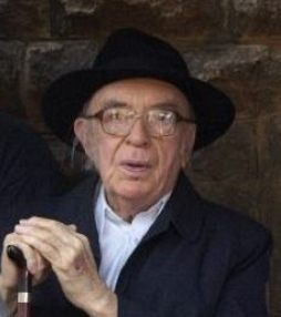 Hernádi Gyula magyar író, forgatókönyvíró.